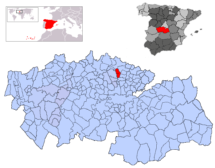 Chozas de Canales en la provincia de Toledo